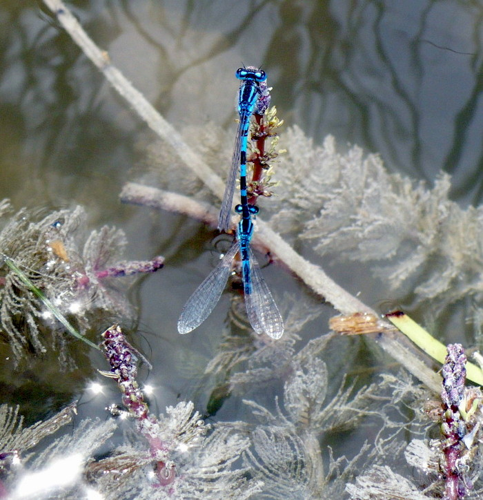 Coenagrion puella